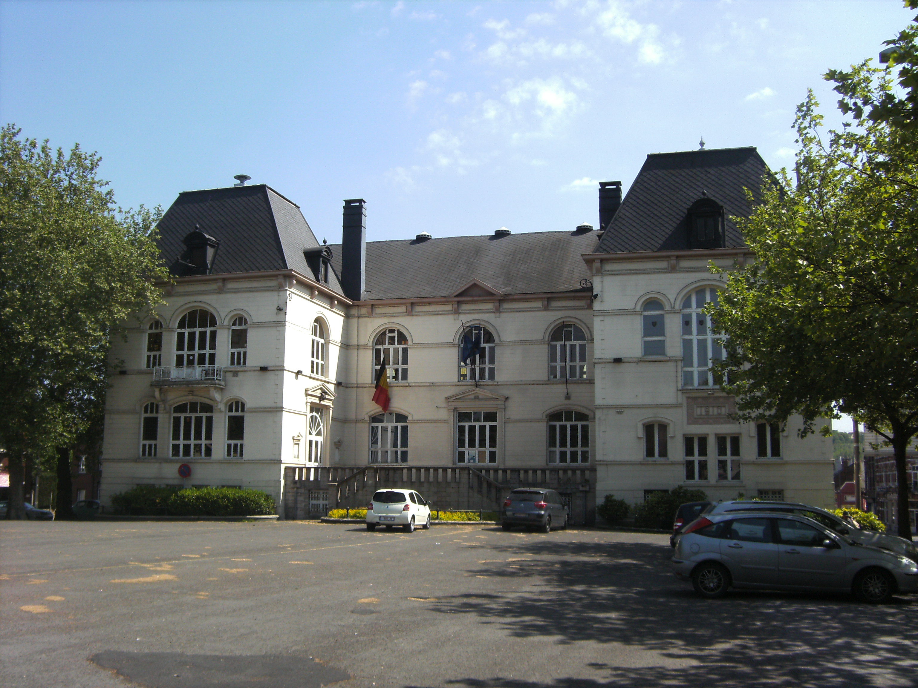 Montignies-sur-Sambre (Charleroi-Belgique) - Place Albert Ier, Hôtel de Ville.